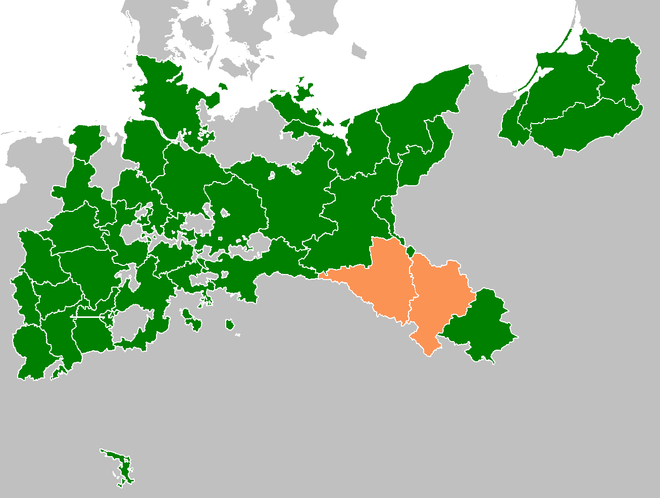 Neder-Silezië in Pruisen 1922